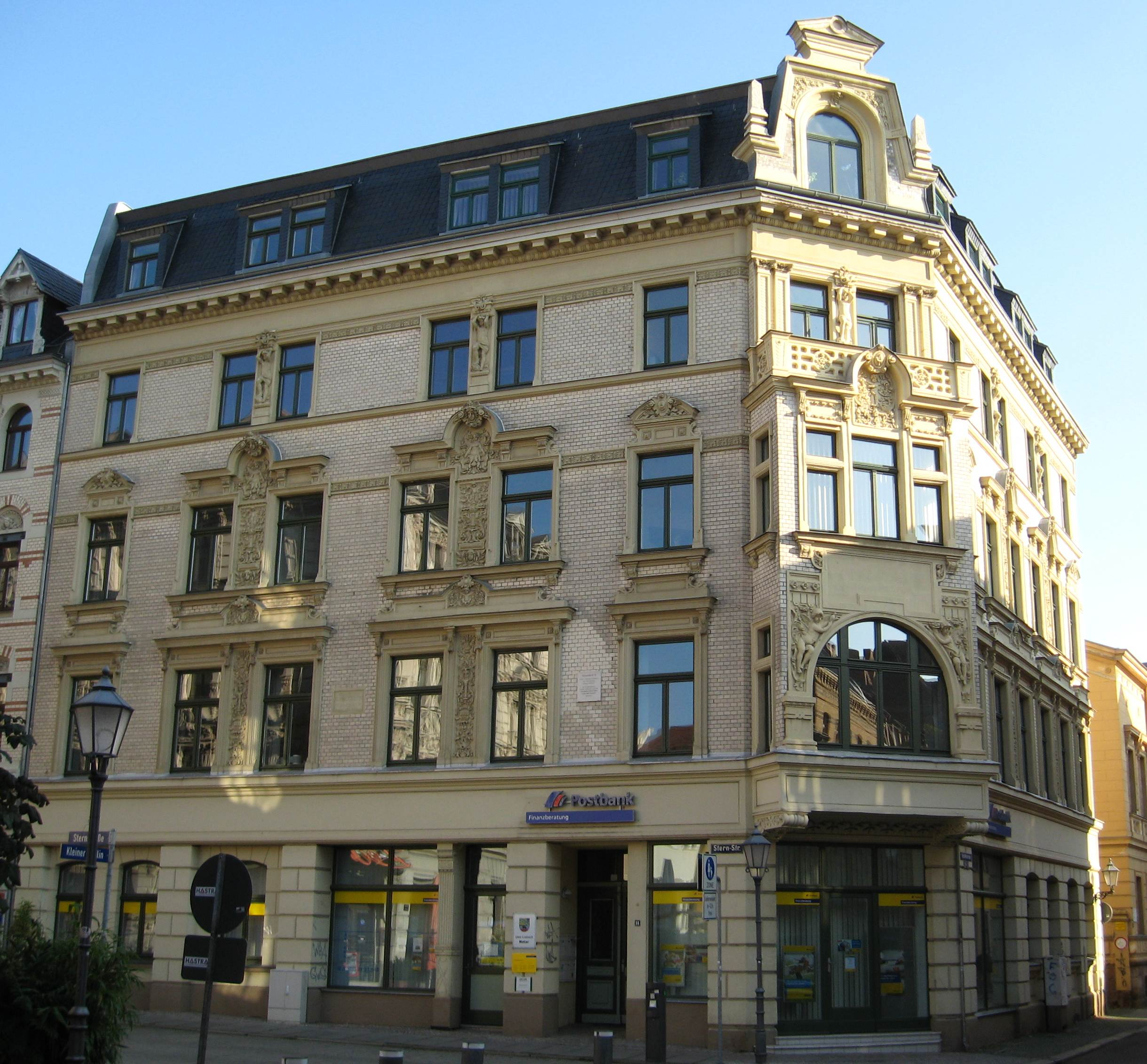 Sternstraße 14 in Halle (Saale) .